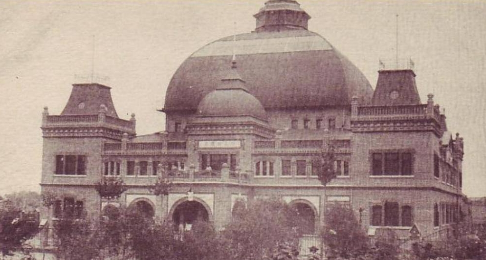 顺直咨议局